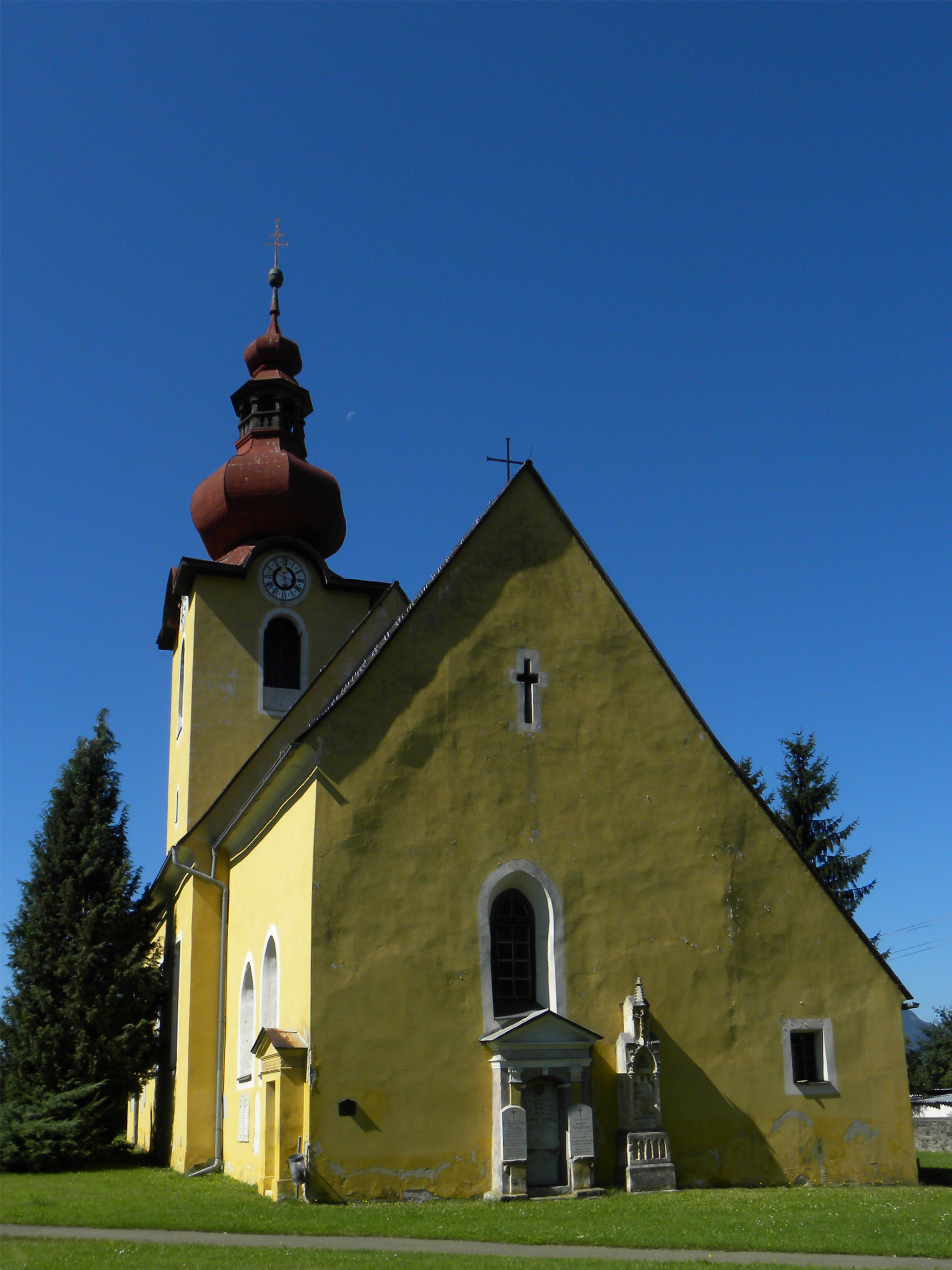 Kath. Pfarrkirche hl. Thomas und ehem. Friedhof